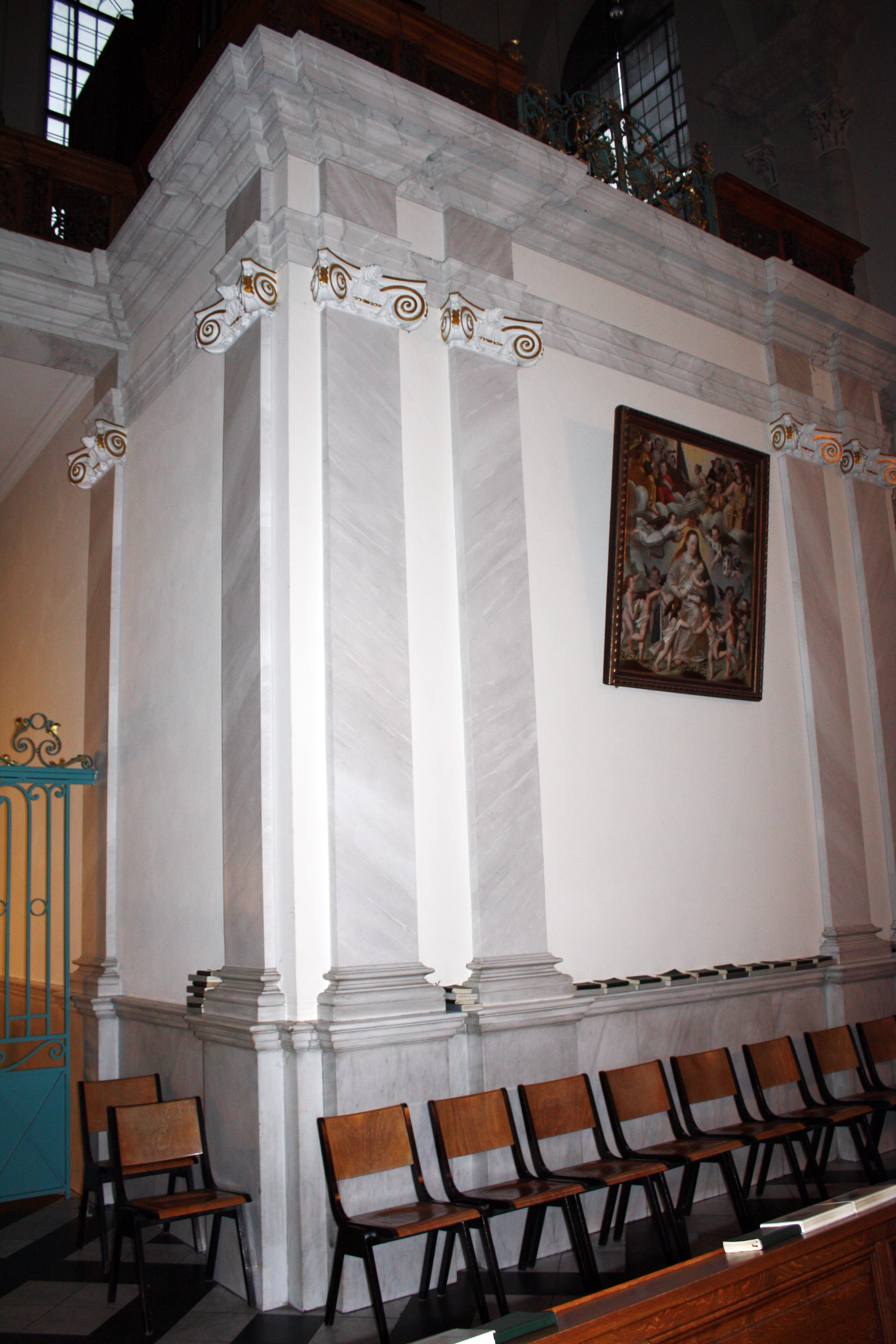 Köln, St. Maria in der Kupfergasse. Innenraum, Kapelleneinbau